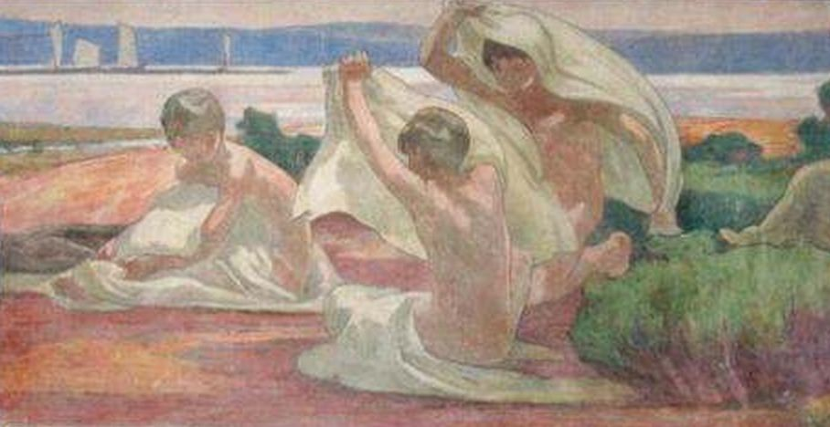 Wallerstein